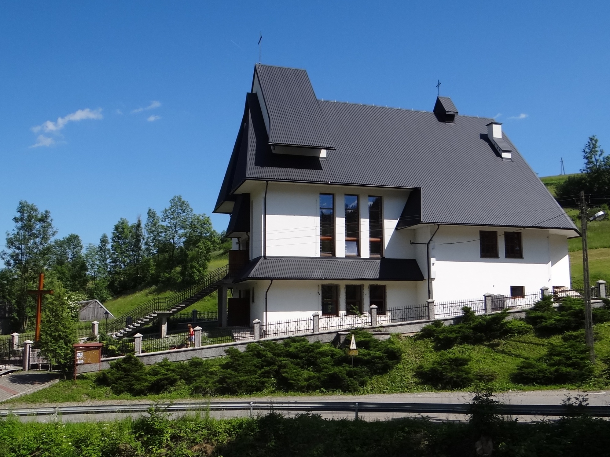 Zasadne kościół